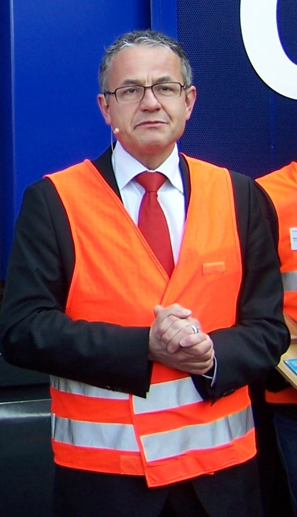 Nicolas Perrin bei der Taufe der SBB Eem 923 001 auf den Namen Heitern.